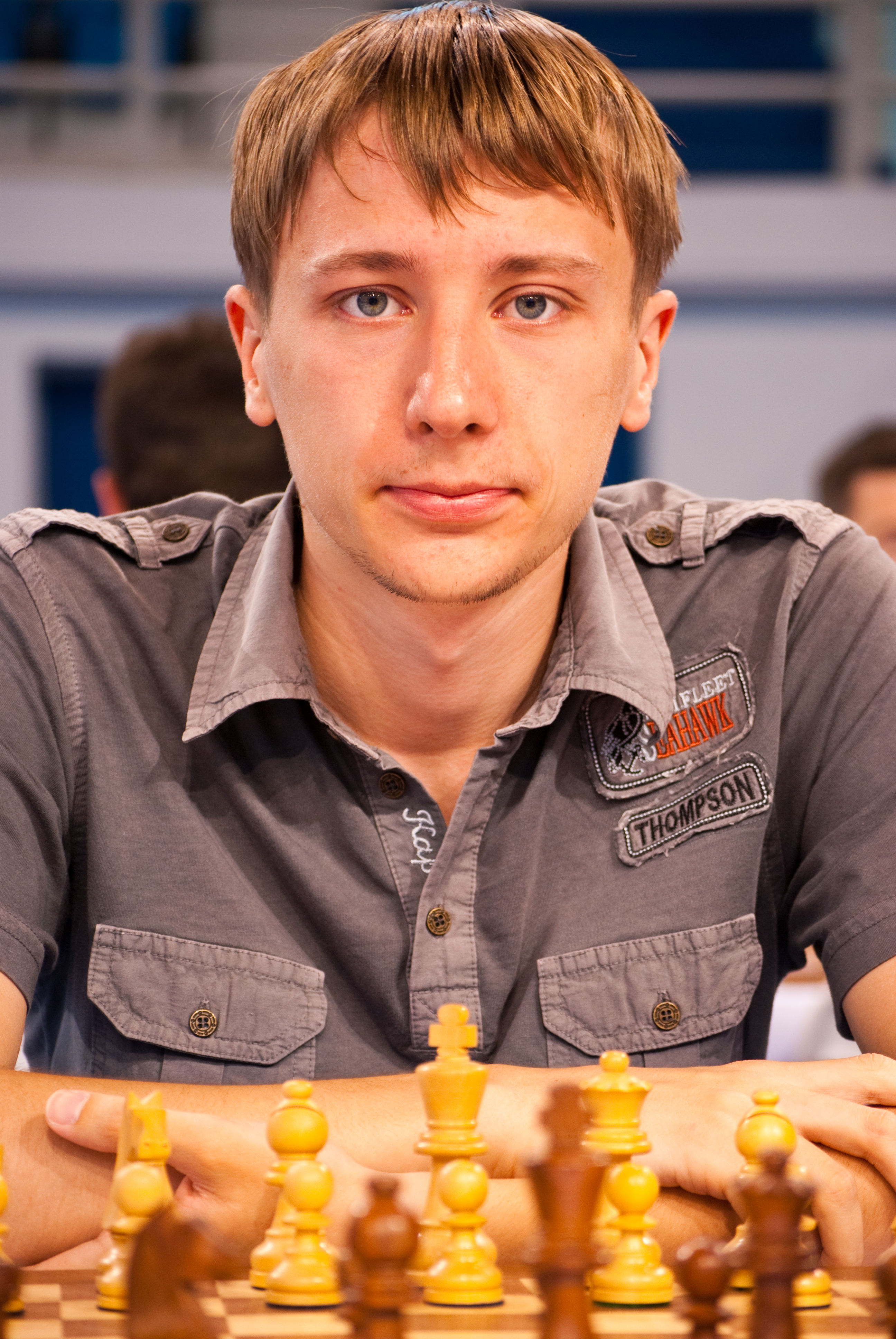 GM Yuriy Kryvoruchko